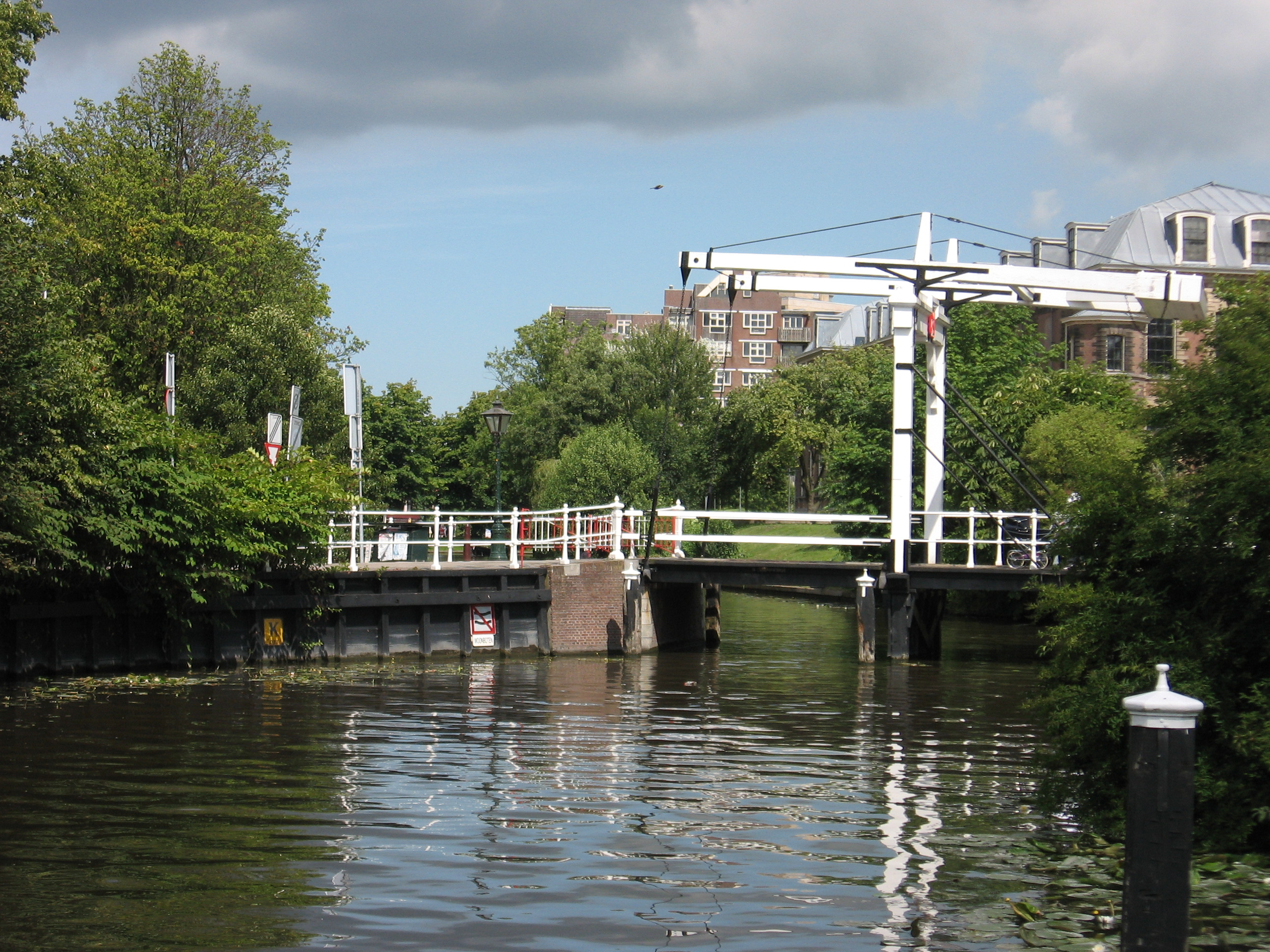 Morspoortbrug Leiden 039.jpg